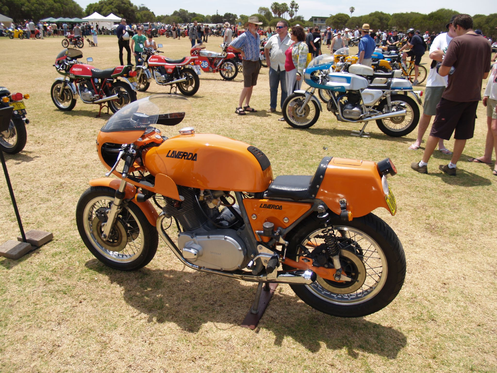 Laverda 750 SFC 3ª serie del 1975, telaio n.18389